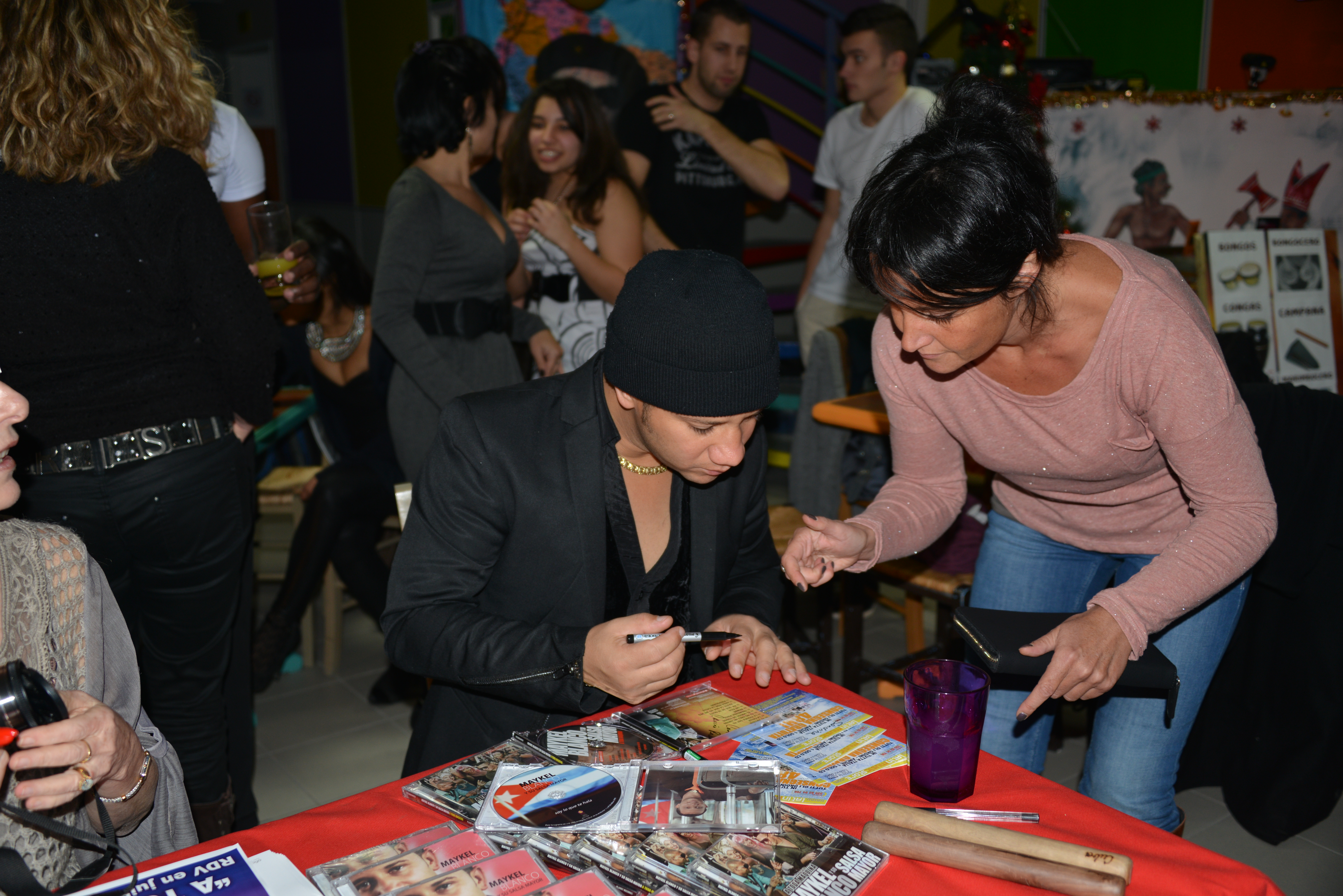 Maikel Blanco Cuevas au Cuba Tropicana à La Rochelle en janvier 2013. Maikel Blanco en train de dédicacer ses albums musicaux. Soirée dansante au Cuba Tropicana en l’ honneur de Maikel Blanco Cuevas (Maykel Blanco) venu en France pour la présentation de son nouvel album « A Toda Maquina » et la préparation de sa tournée de concerts en juillet 2013. Maikel Blanco est un auteur-compositeur cubain de timba. Le Cuba Tropicana est un établissement d’ enseignement des danses latines et un bar géré par Rey Martinez Piloto et Deborrah Fronteau. La Rochelle, Charente Maritime, France.